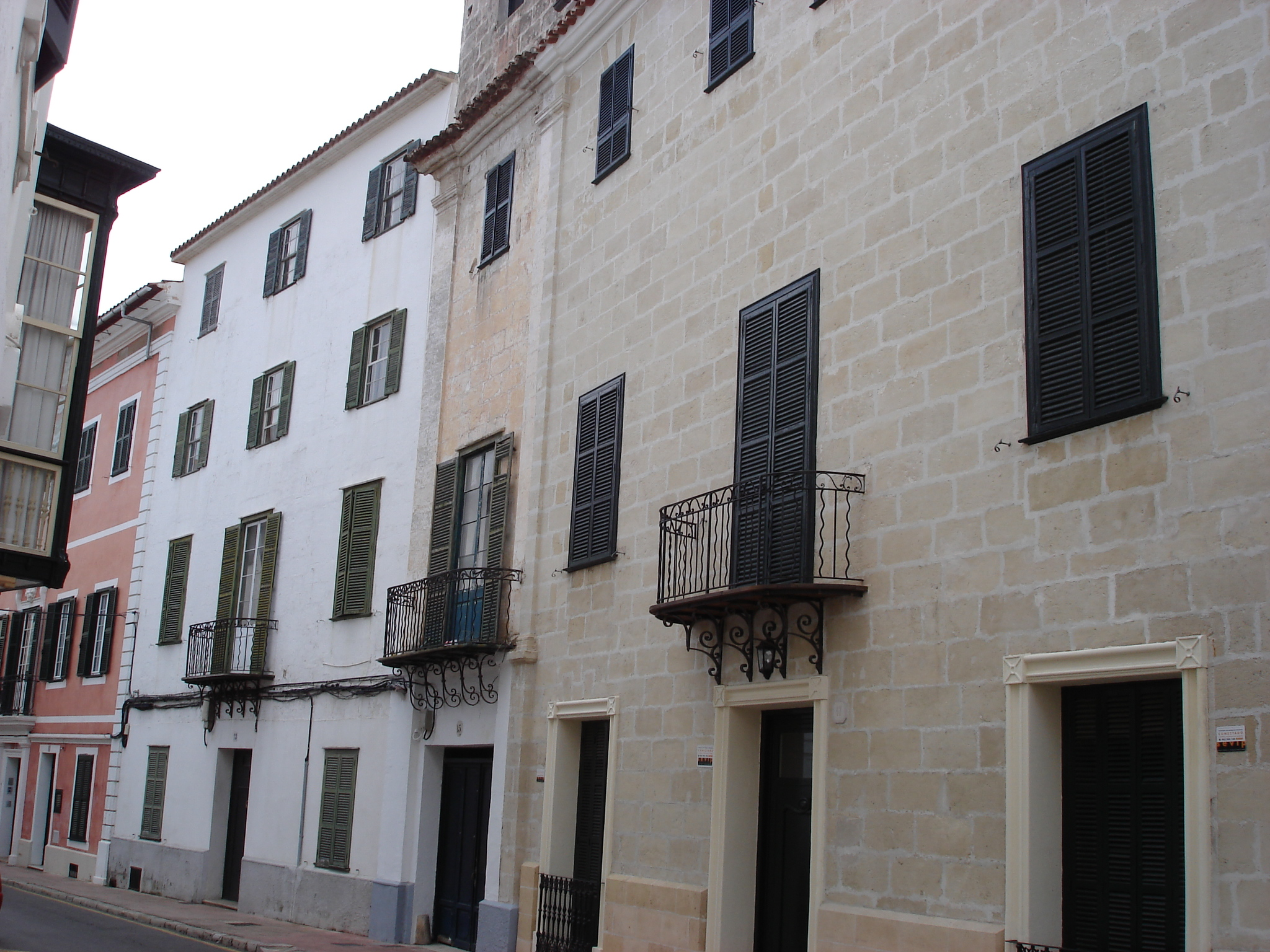 Cases del Carrer Isabel II de Maó